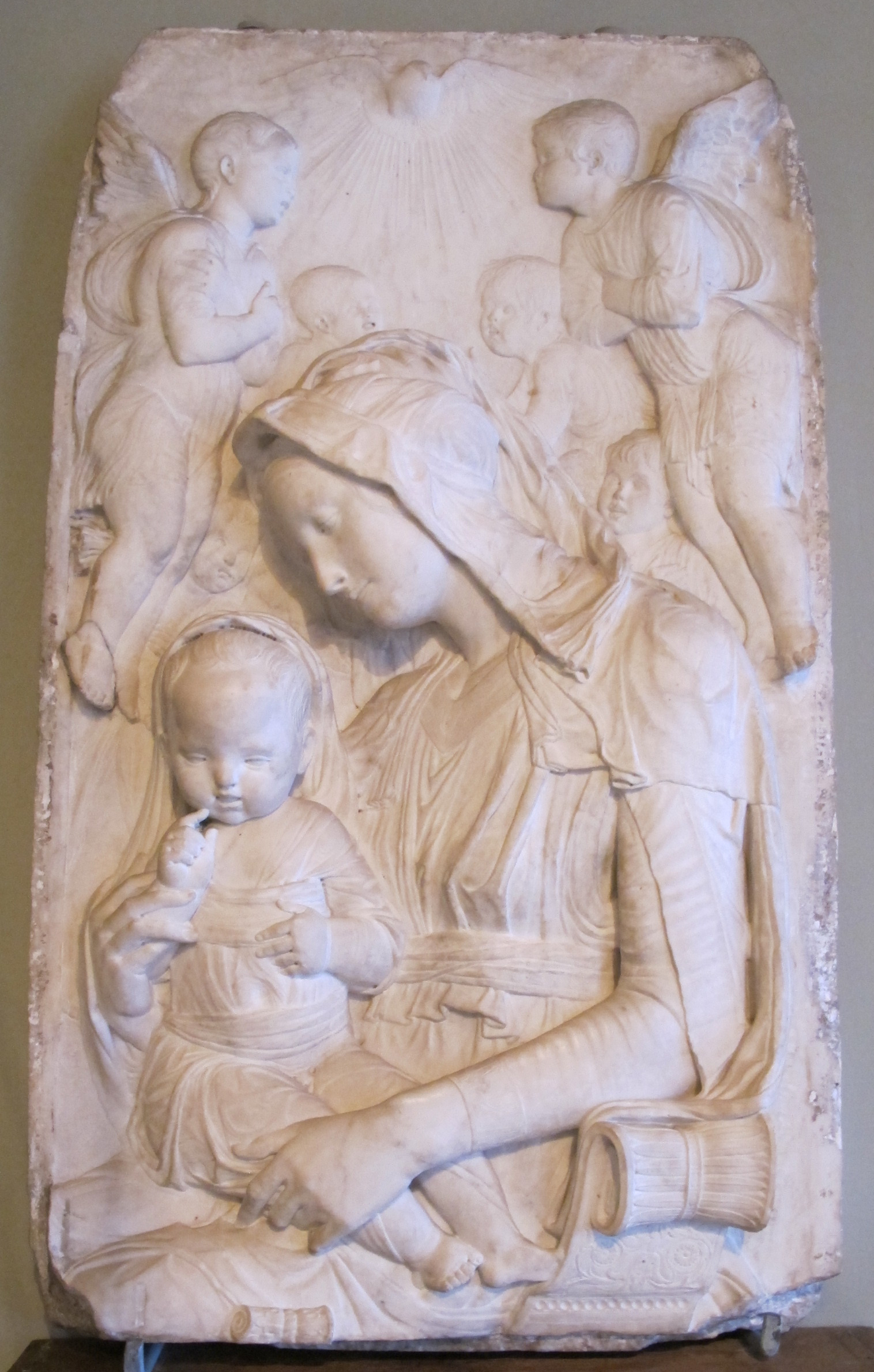 Francesco di simone ferrucci (attr.), madonna col bambino e angeli